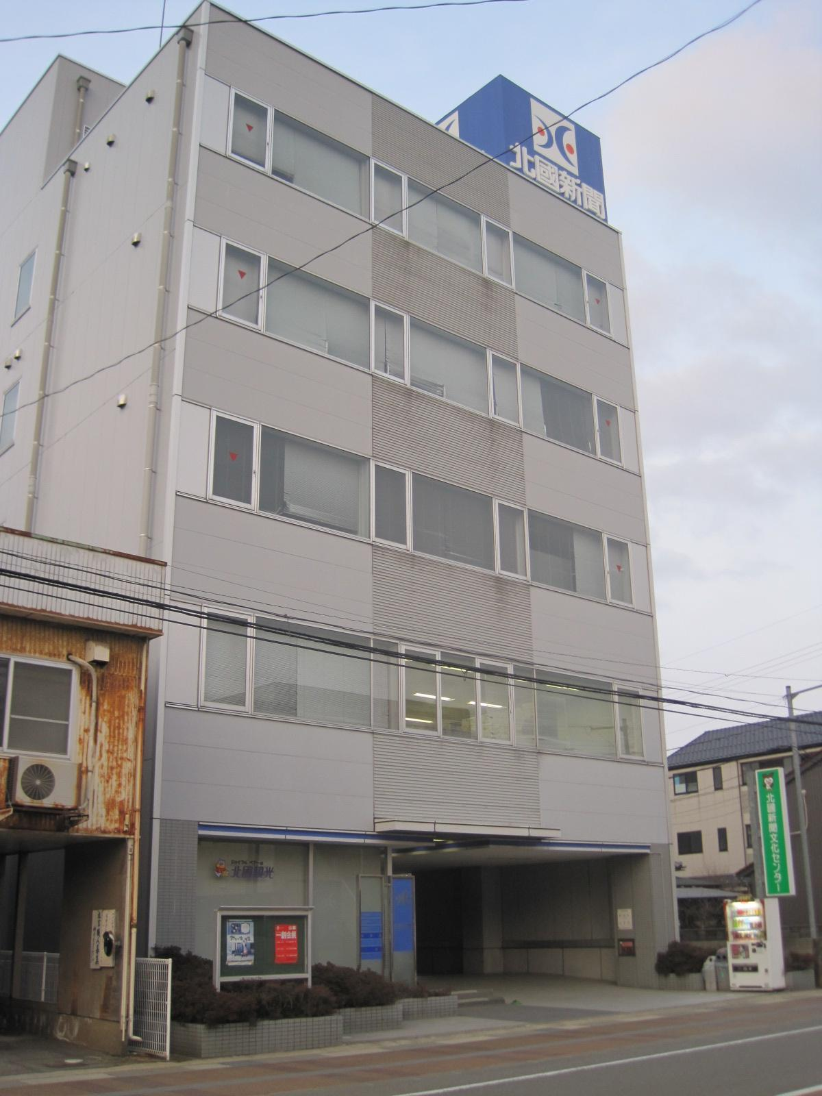 北國新聞社小松支社、ビル内にはラジオこまつも入居している。